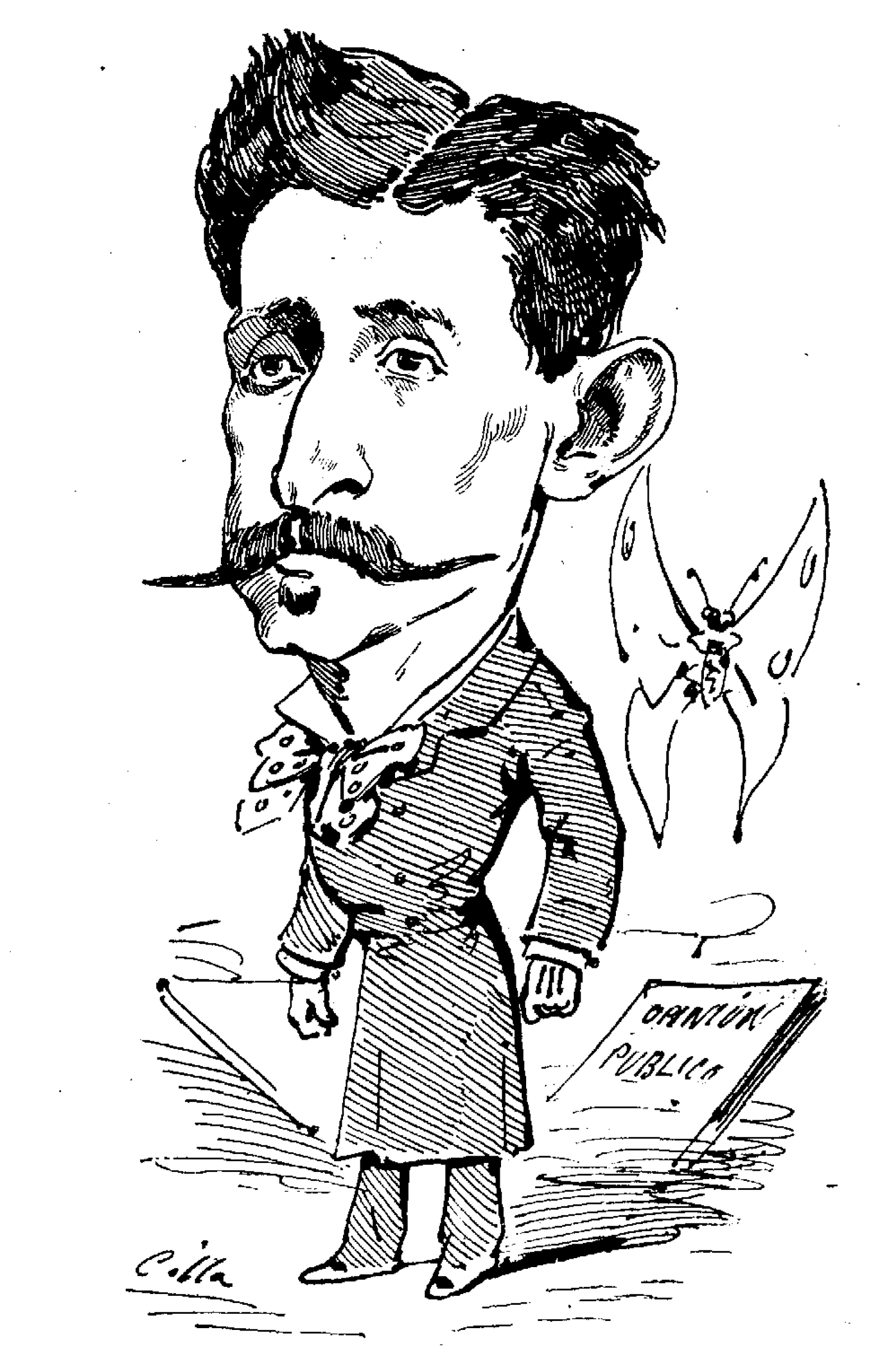 Leopoldo Cano y Masas.